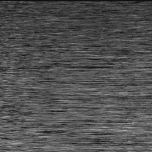 História Temporal do Padrão de Speckle THSP